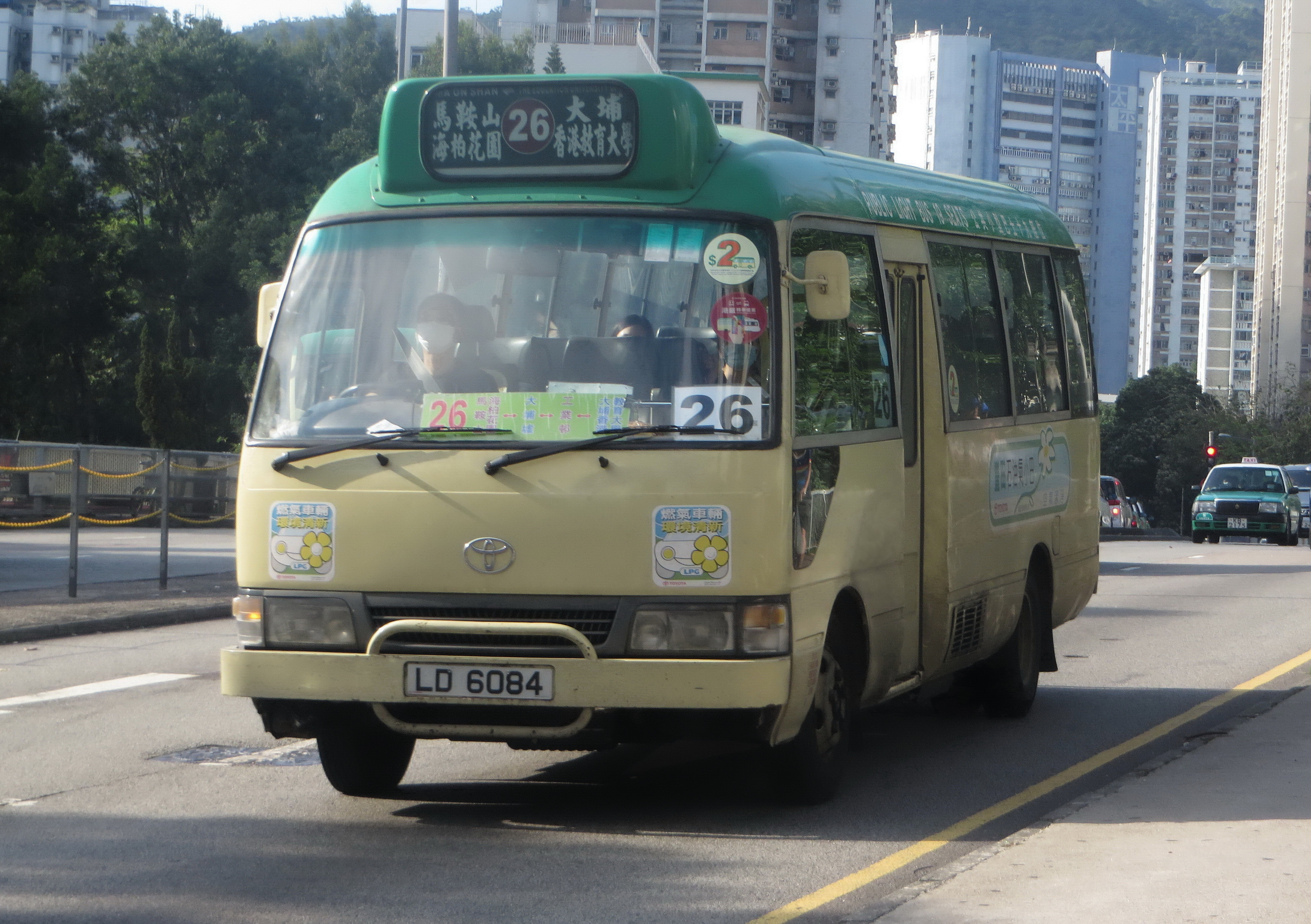 中文（中国大陆）: 小巴LD6084的照片